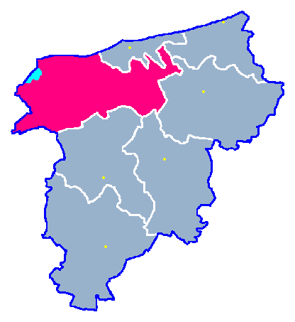 Locator maps for communes in województwo zachodniopomorskie : Kołobrzeg gm.png (podział na gminy)